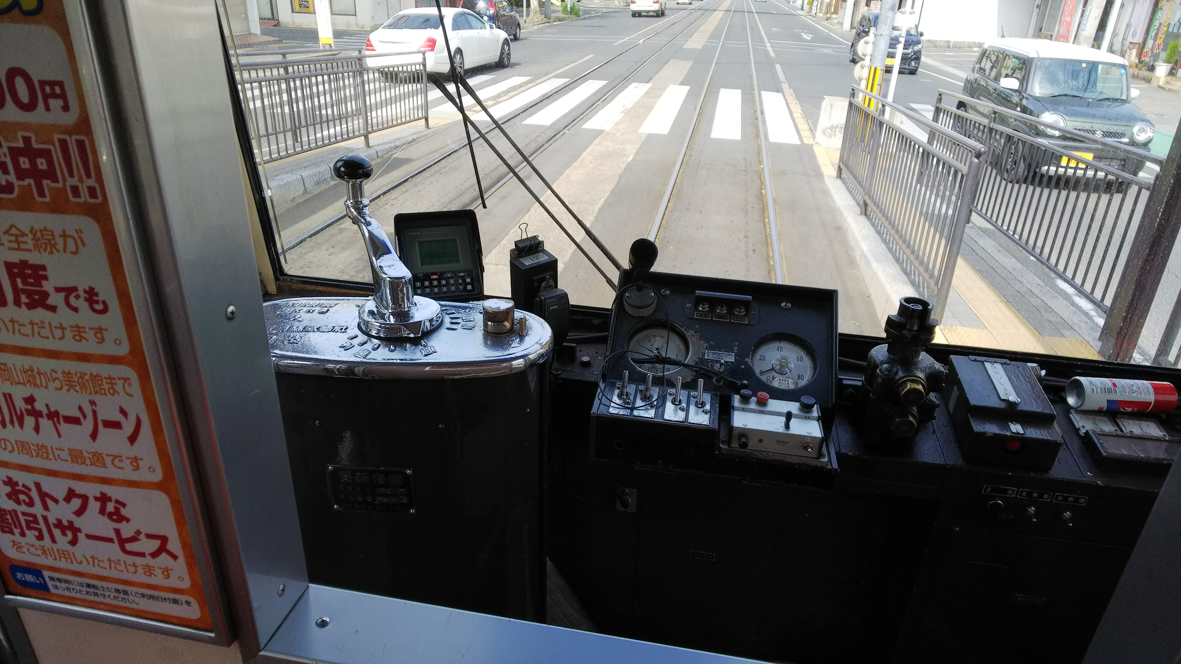 運転台（7100型）